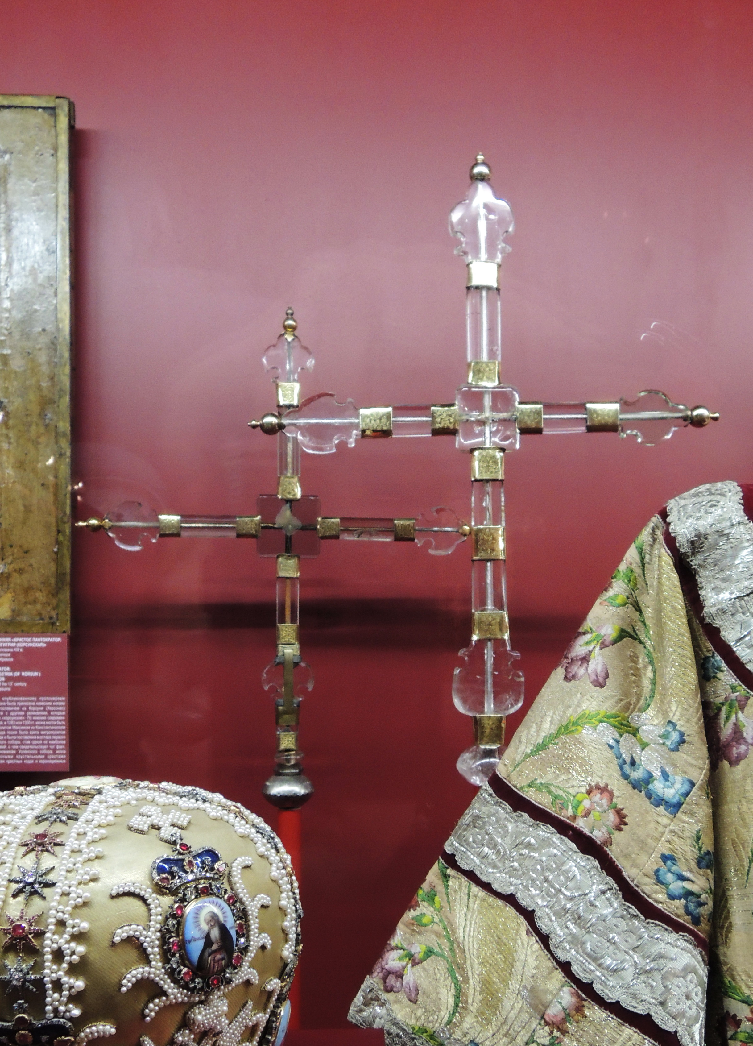 Крест выносной Корсунский. Западная Европа, 15 (?) век. Серебряные обкладки - Россия, 16-17 вв. ММК. Крест выносной Корсунский. Россия, 2-я пол. 17 в. ММК. Сделан по образцу предыдущего.